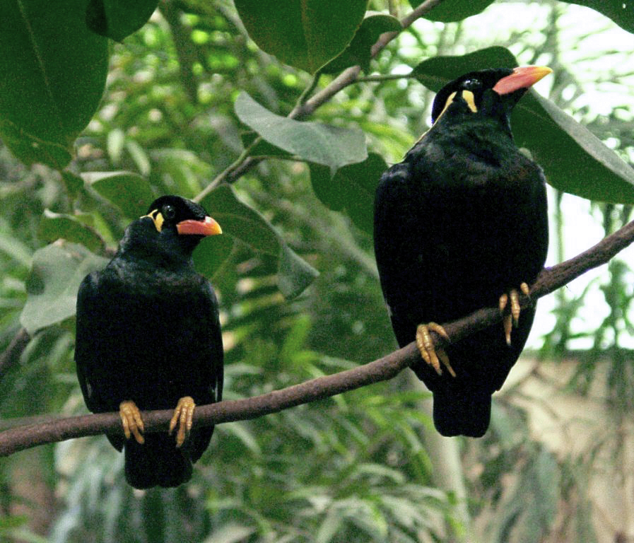 Gracula religiosa, Zoologischer Garten Eberswalde